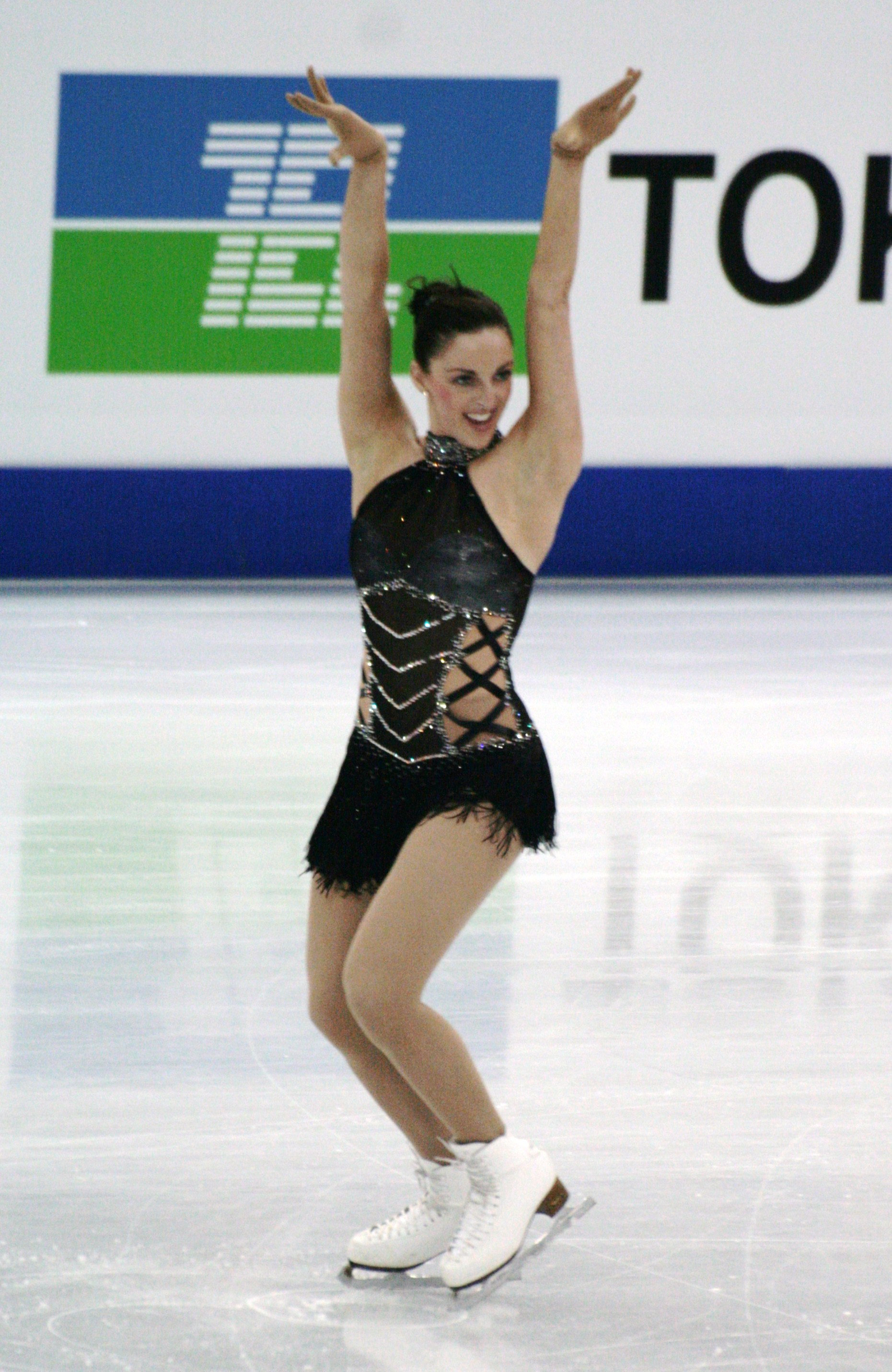 Дженна Маккоркелл (Великобритания) на чемпионате мира по фигурному катанию 2012 года.